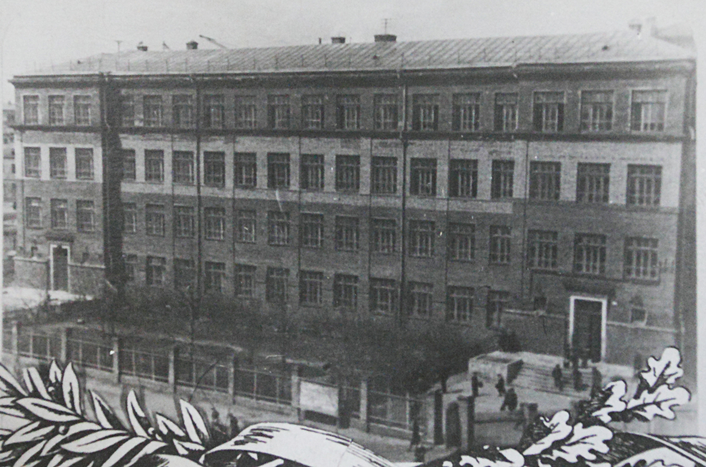 Старое здание школы